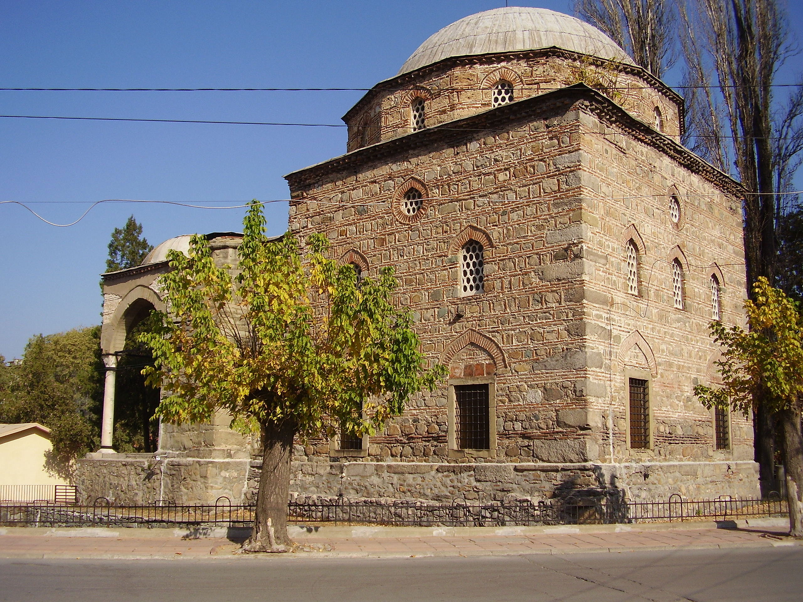 Джамия "Ахмед Бей" - гр.Кюстендил